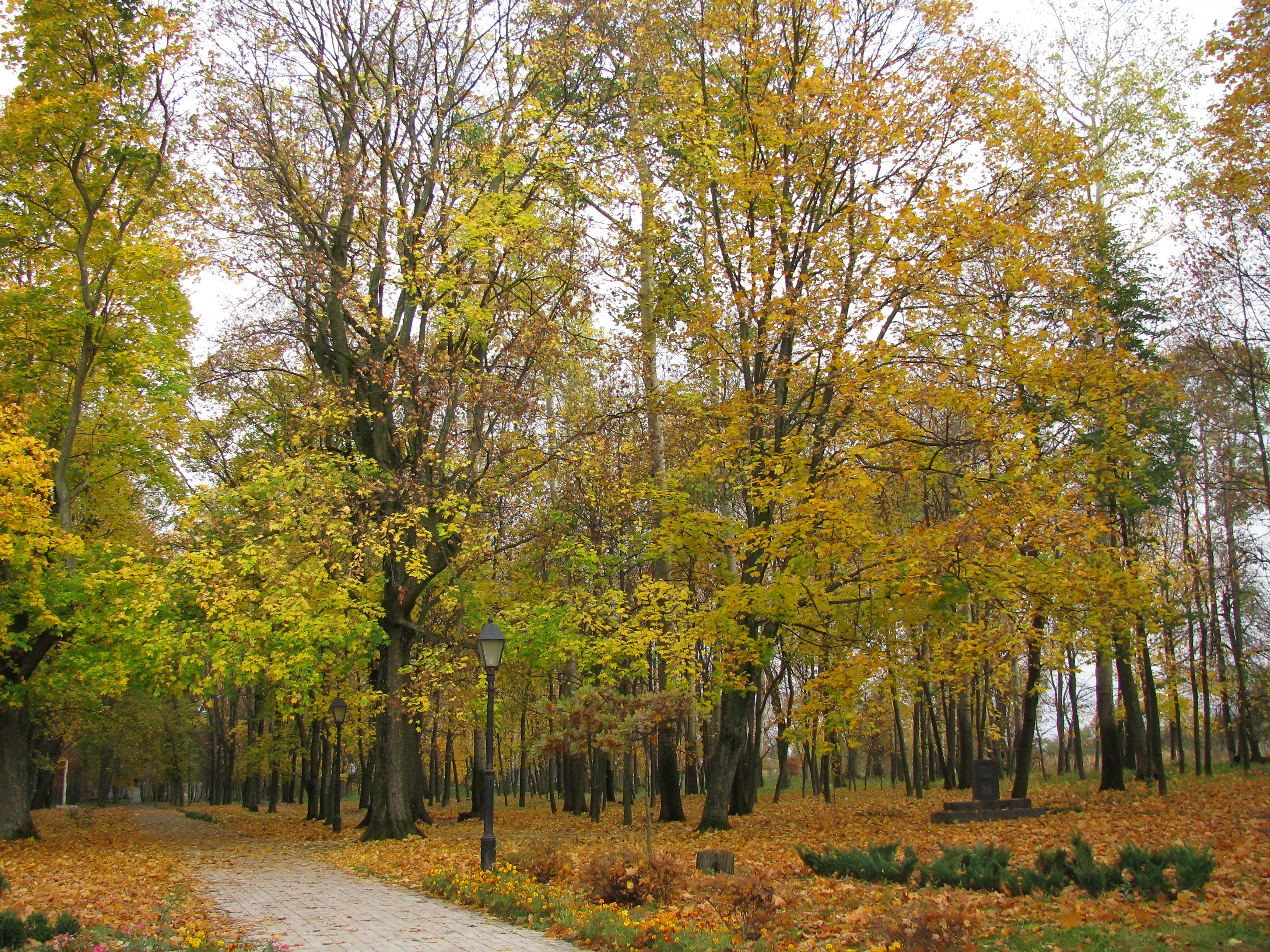 Кочубеївський, Бахмацький район, смт. Батурин